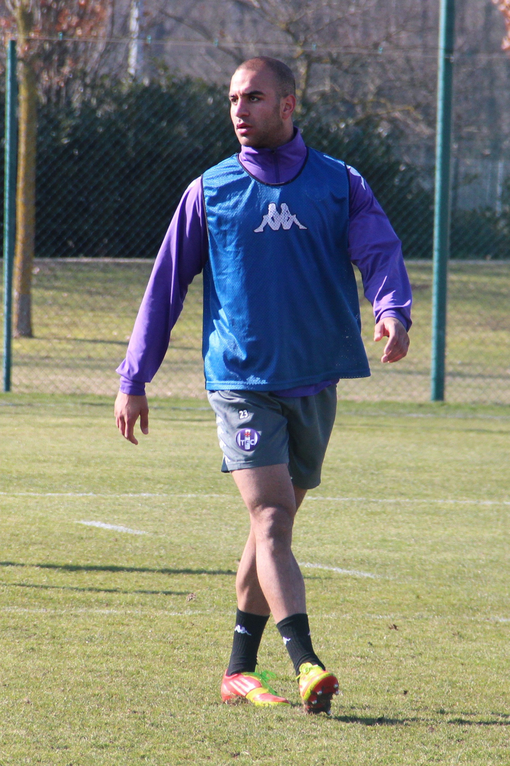 Aymen Abdennour pendant un entraînement du Toulouse Football Club. Même image que File:AymenAbdennour.JPG en recadré.